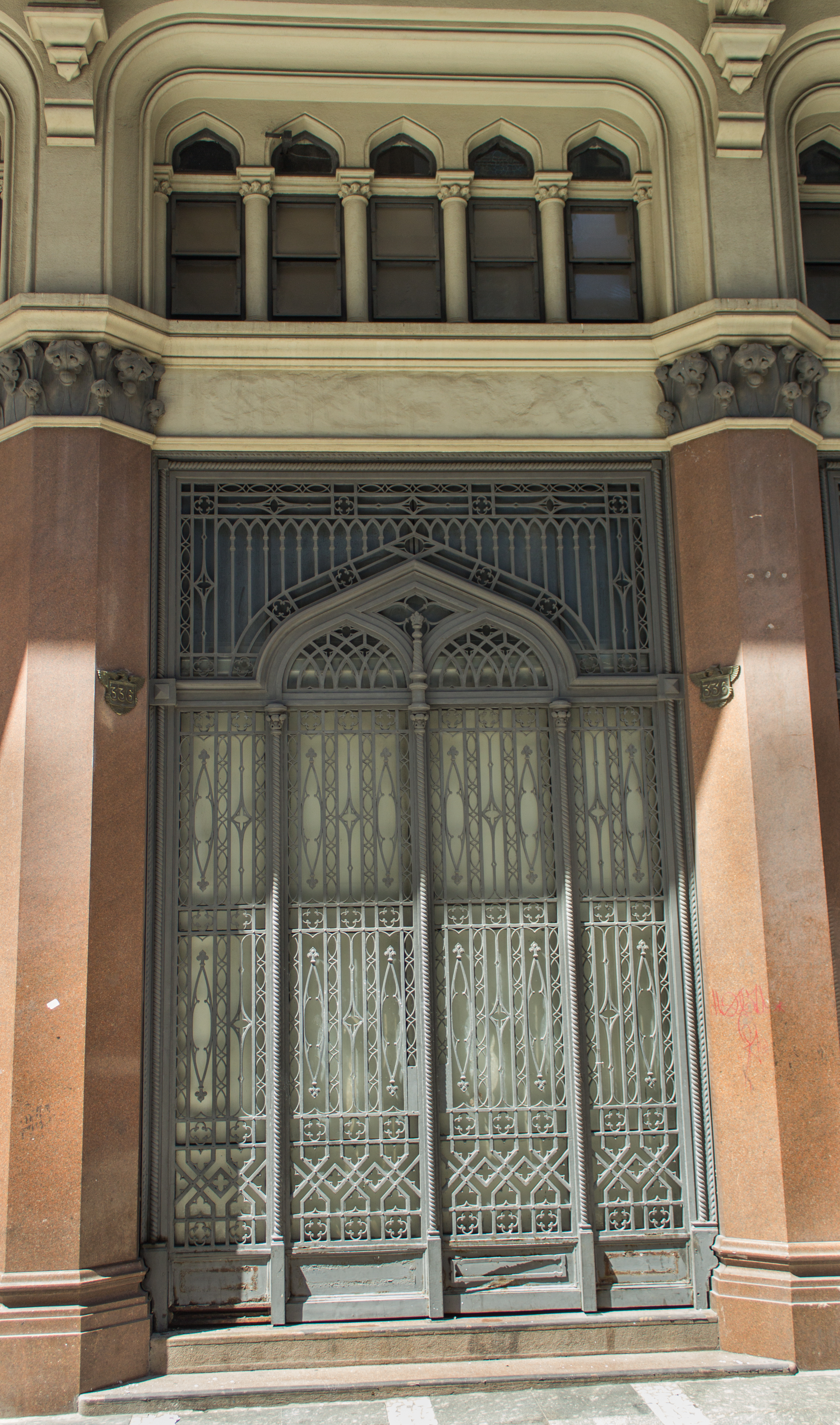 Fachada do Edifício do London & River Plate Bank, em São Paulo (SP), Brasil.